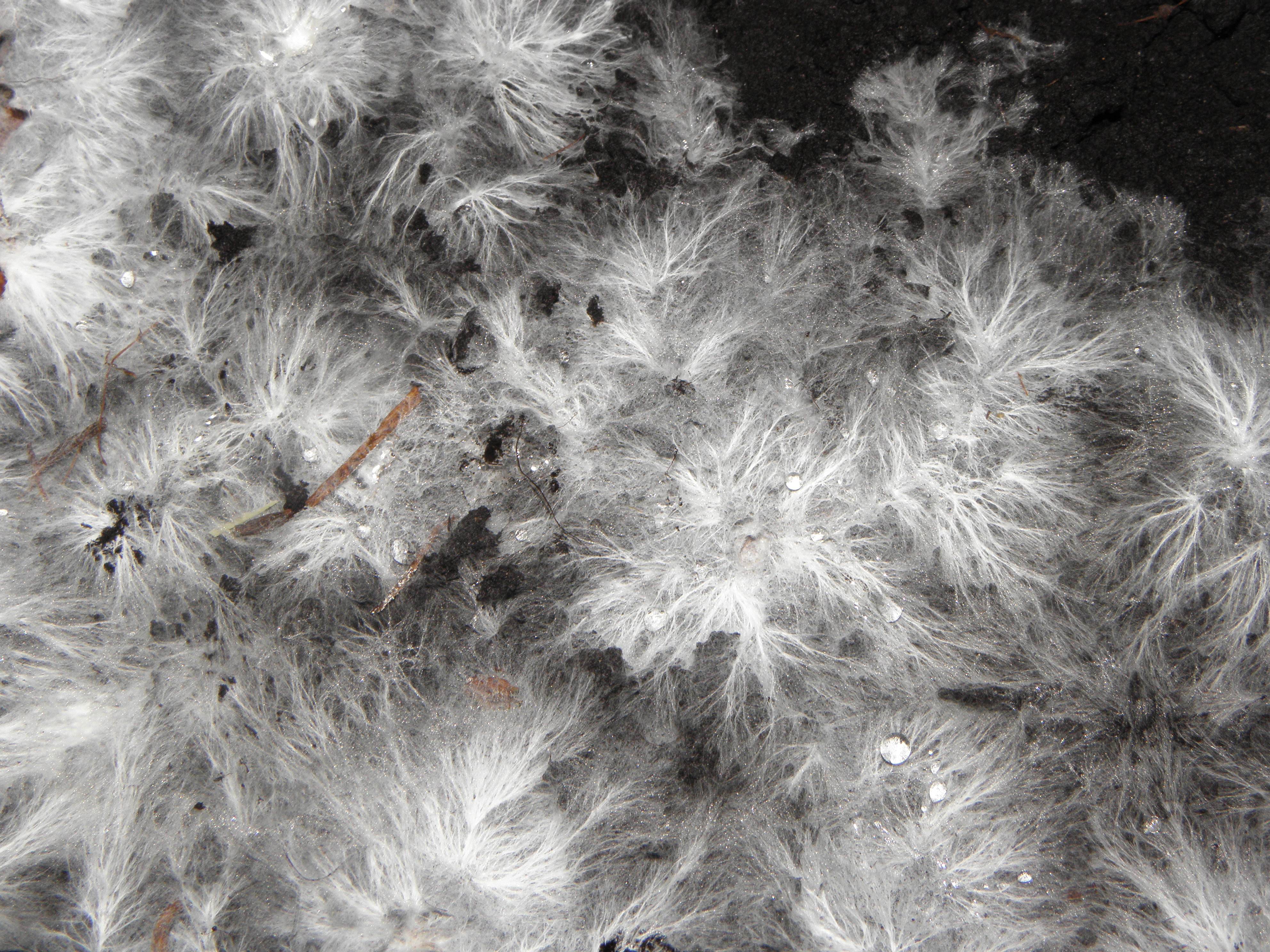 Agaricus bisporusLatina: Mycelium